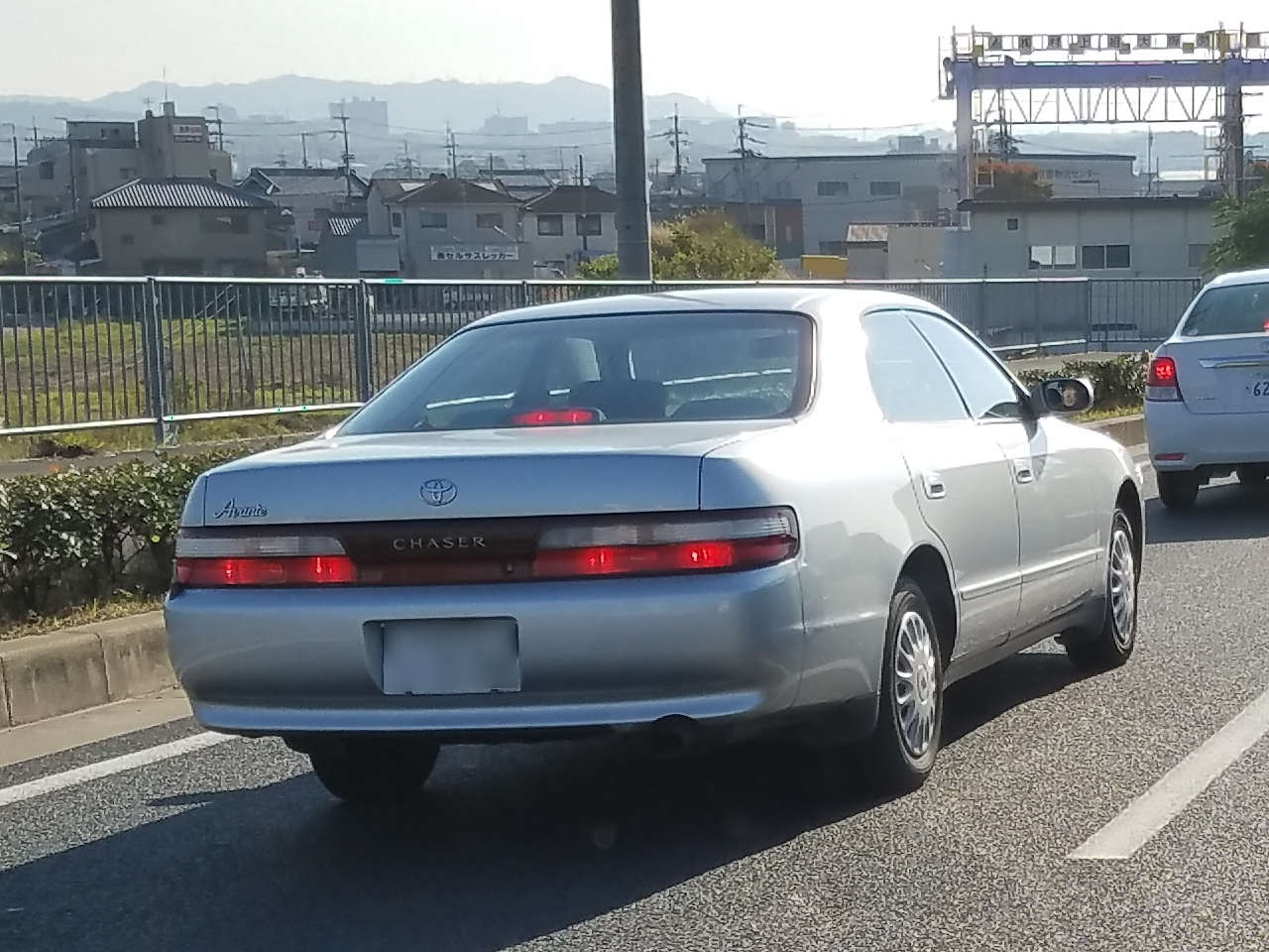 チェイサー 2.0アバンテ（後期型）